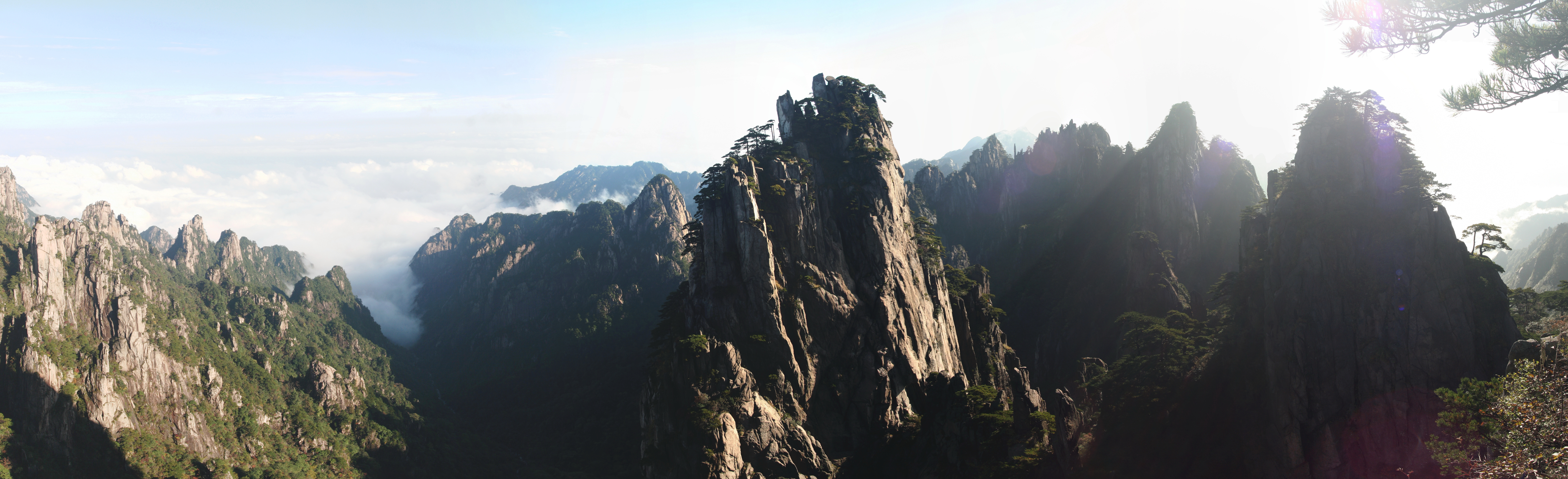 Huangshan (黄山), China